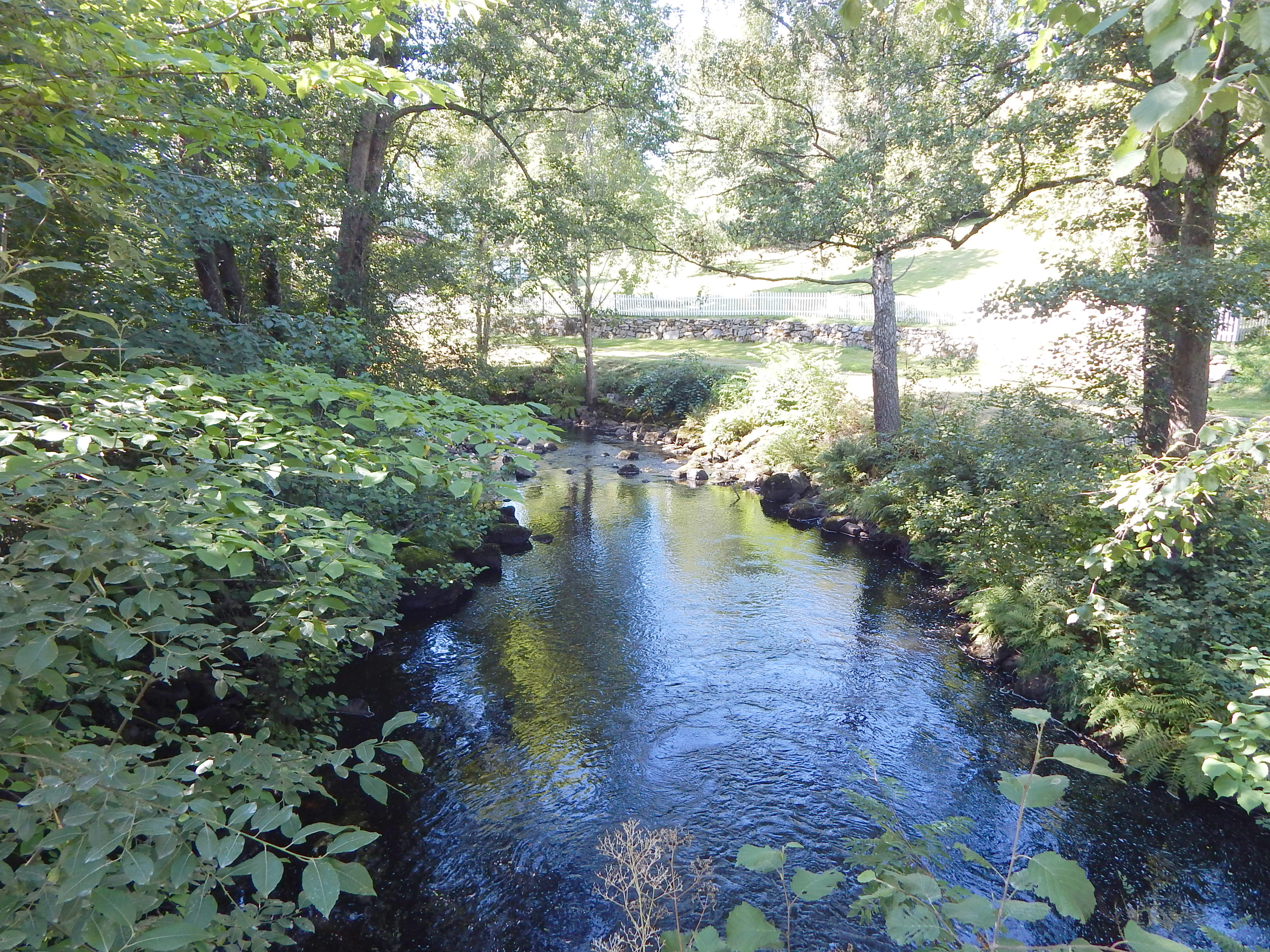 Vikselva nedstrøms fra Gruslinna på Tangen